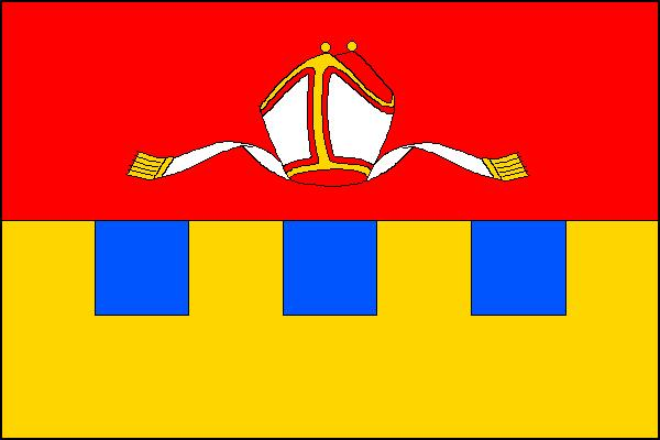 Vlajka obce Šebetov